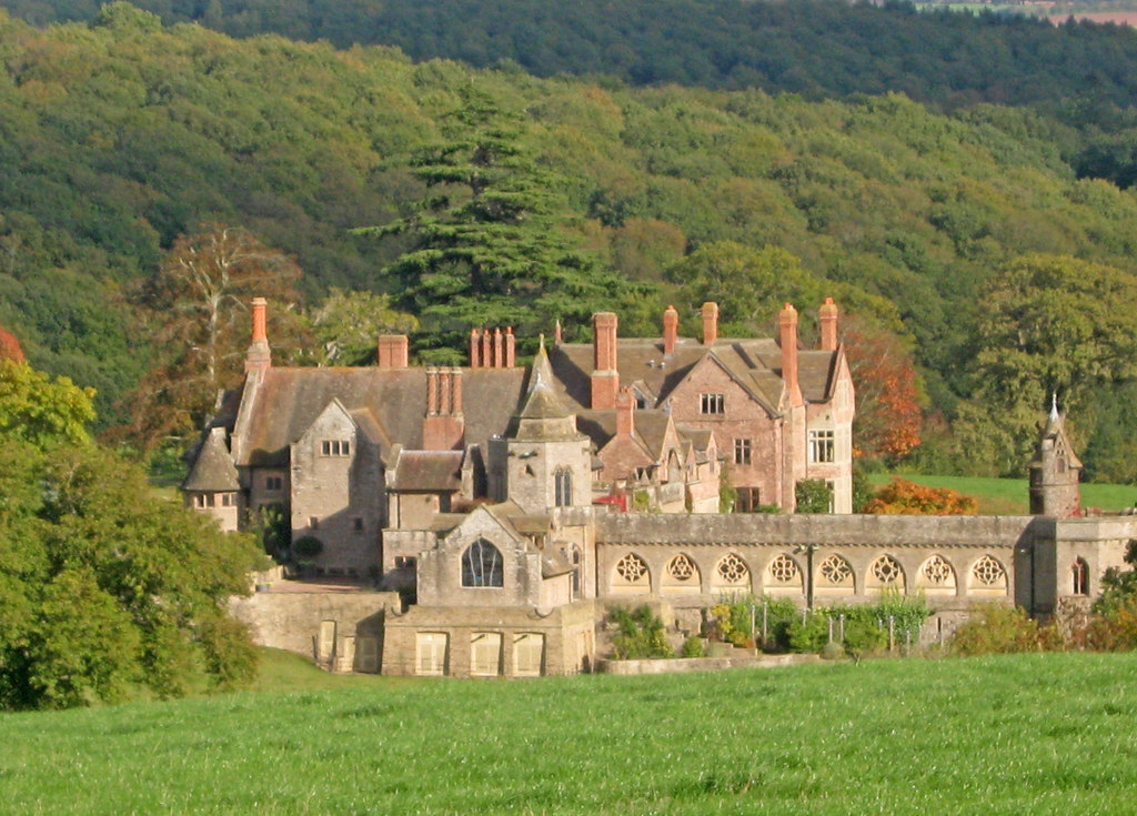 View north-east from the public footpath at the head of the valley. A building of many parts, which has been developed from the original Knights Templar preceptory which was here in 1189. The cloister on the right leads from the formal gardens to the mainly 14th century chapel of St John of Jerusalem on this side of the building at the centre of the picture. The main part of the huge manor house behind is 16th century. We visited the building many years ago when it was open to the public, but it is now a private residence owned by TV, mobile phone and telecommunications entrepreneur Martin Dawes.